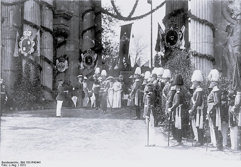 Potsdam, Kaiser Wilhelm II., Schrippenfest ADN-ZB/Archiv Im kaiserlichen Deutschland 1913 Jedes Jahr am zweiten Pfingstfeiertag wird in Potsdam das Stiftungsfest des Infanterie-Lehrbattaillons, das sogenannte "Schrippenfest", gefeiert. Der Kommandierende General Freiherr von Plettenberg erwidert den Toast Kaiser Wilhelm II. (m.) auf das Wohl der Armee mit einem Hurra. 8725-13 Abgebildete Personen: Wilhelm II.: Deutsches Reich, Kaiser, II., Deutschland